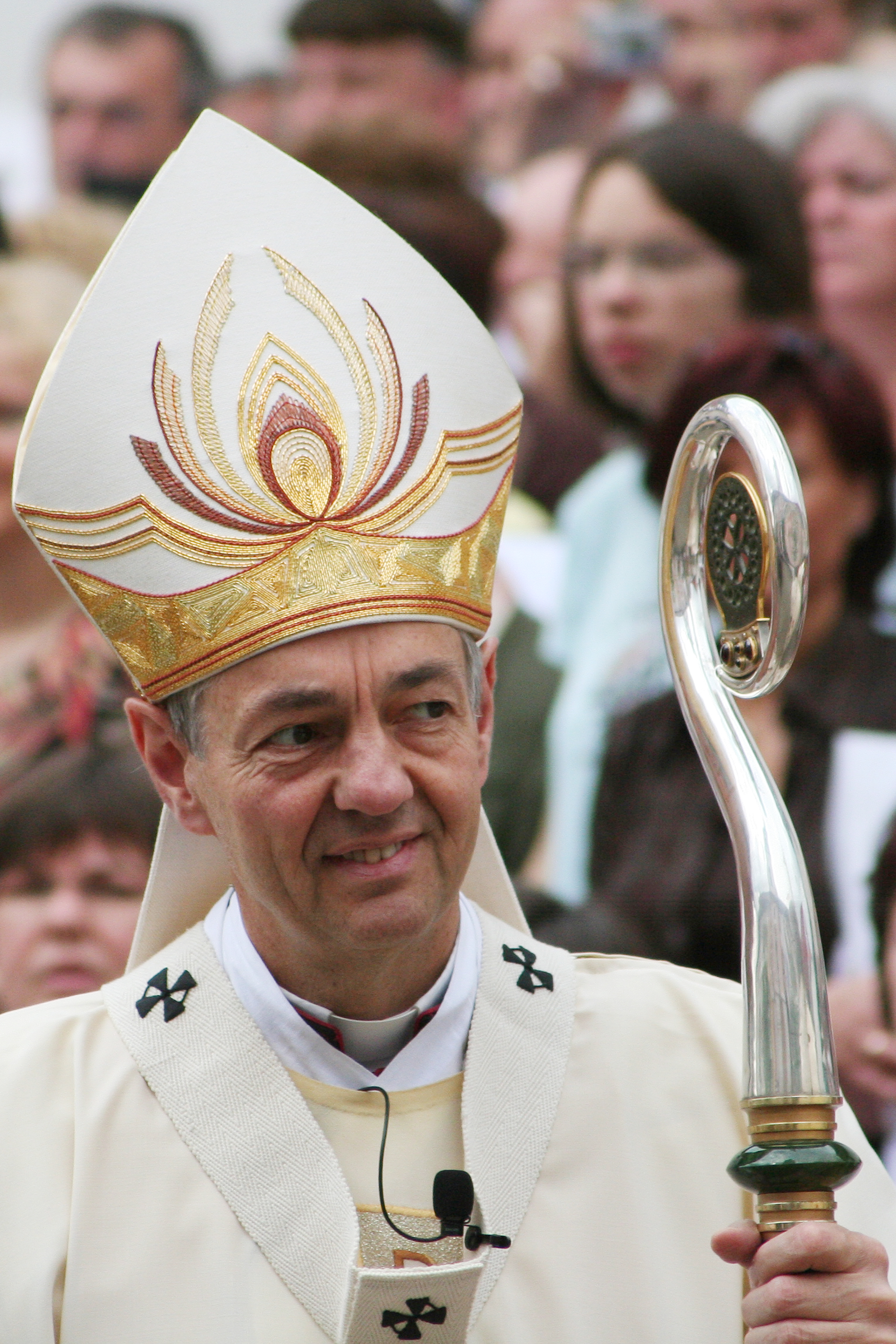 Bamberger Erzbischof Prof. Dr. Ludwig Schick, beim Dekanatsglaubenstag mit Festgottesdienst in Kloster Michelfeld, anlässlich der Feierlichkeiten 1000 Jahre Bistum Bamberg im Jahr 2007.